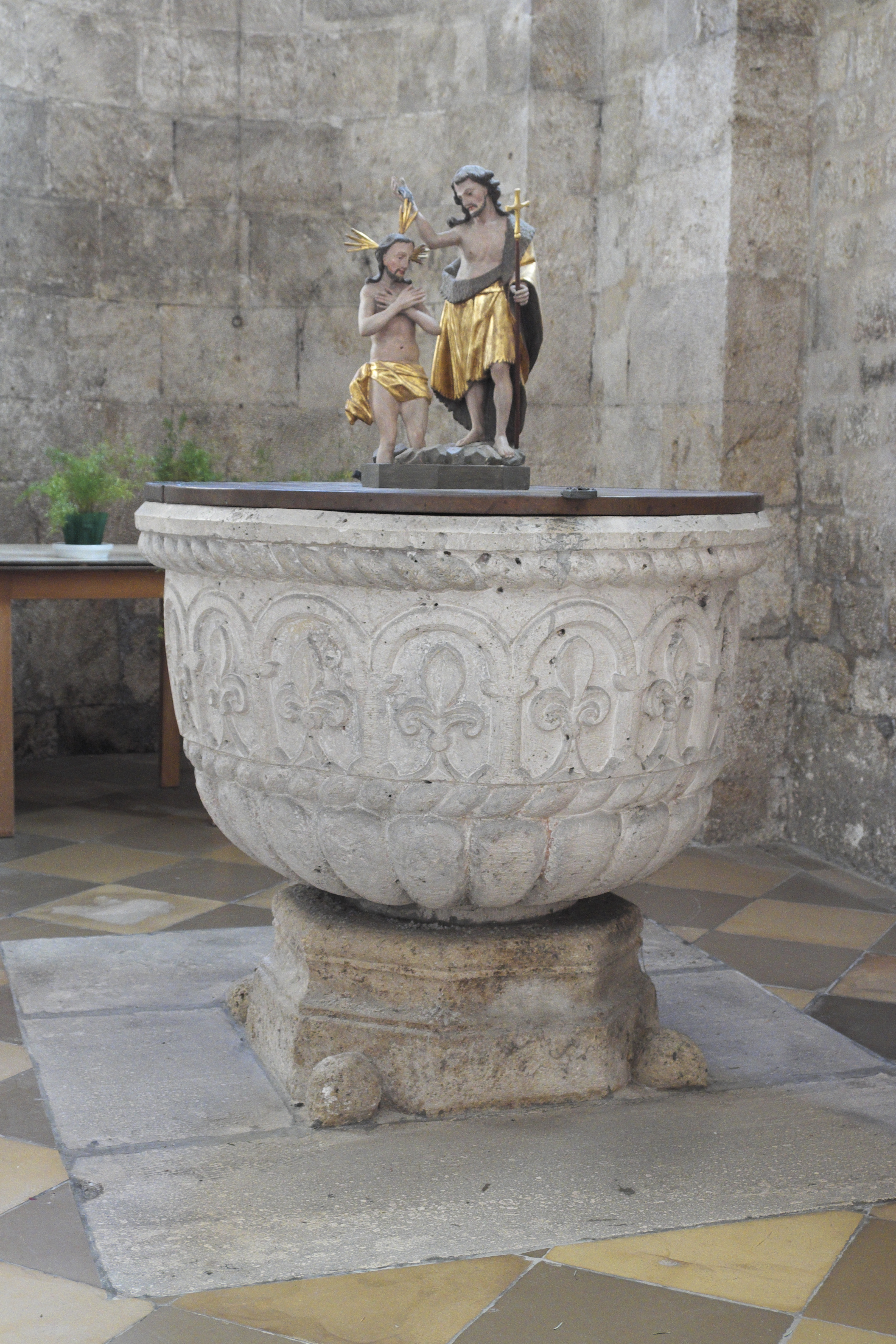 Katholische Pfarrkirche Maria Immaculata in Biburg im niederbayerischen Landkreis Kelheim (Bayern/Deutschland), romanisches Taufbecken, um 1200